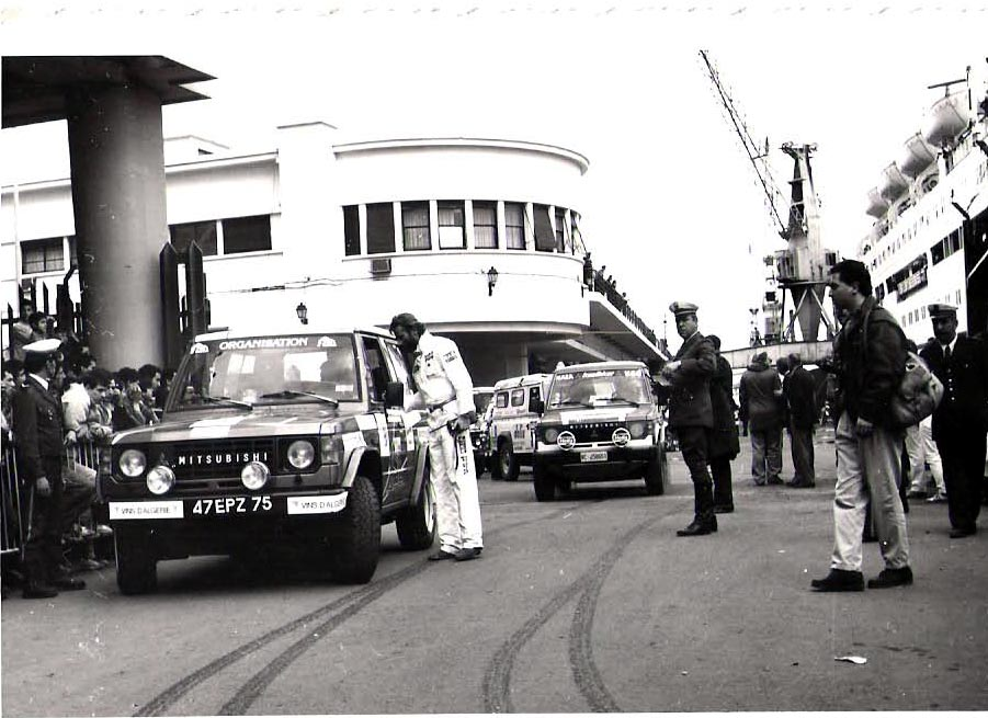 Thierry Sabine au port d'Alger 10 jours avant son décès lors du 8ème Paris-Alger-Dakar